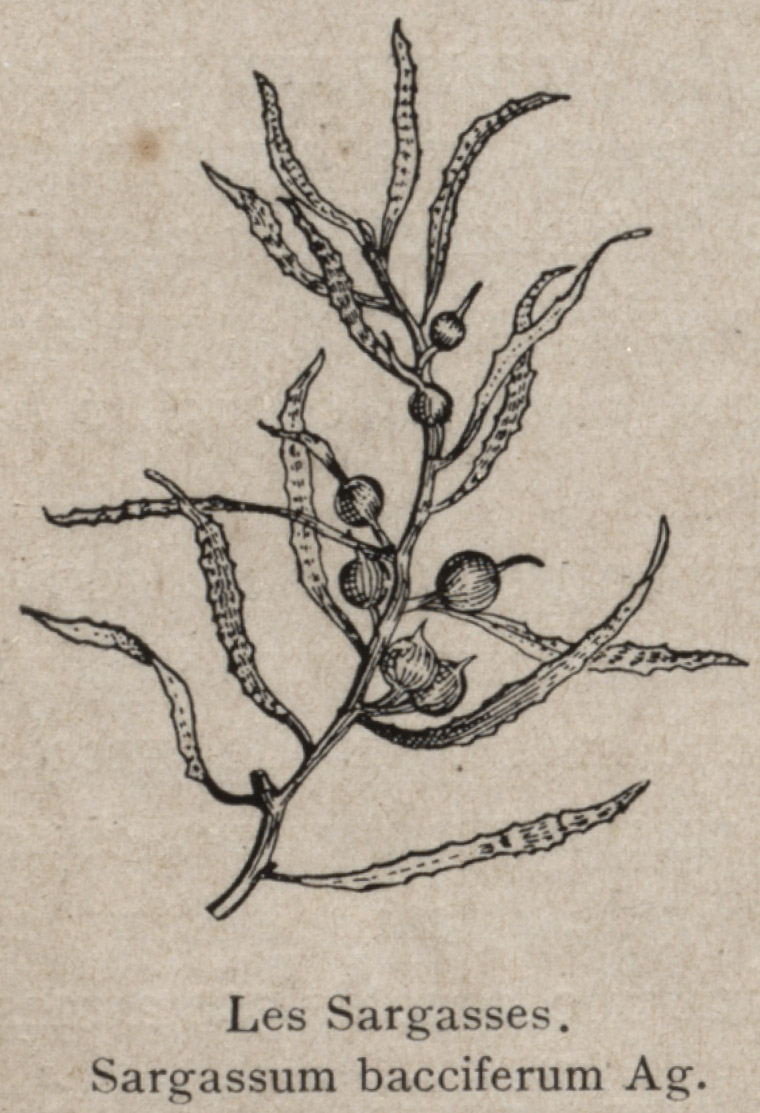 sargasses